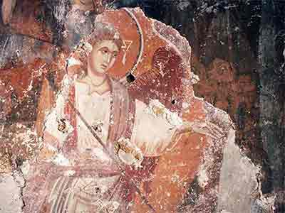 Фреска на Св. Архангел Михаил во истоимената пештерна црква во село радожда, струшко. Сликана кон крајот на 13 век. Фреската е со претстава на сцена од циклусот на Архангел Михаил - "Чудото во Хона". Архангел Михаил е претставен во местото Хона, неговото светилиште како отвора низ карпите цепнатина во која ќе се изгубат матните води на паганите упатени кон исцелителниот извор на светецот. Оваа ретка сцена од Радожда се вбројува меѓу најстарите претстави на "Чудото во Хона" во ѕидното сликарство на целокупната христијанска уметност.